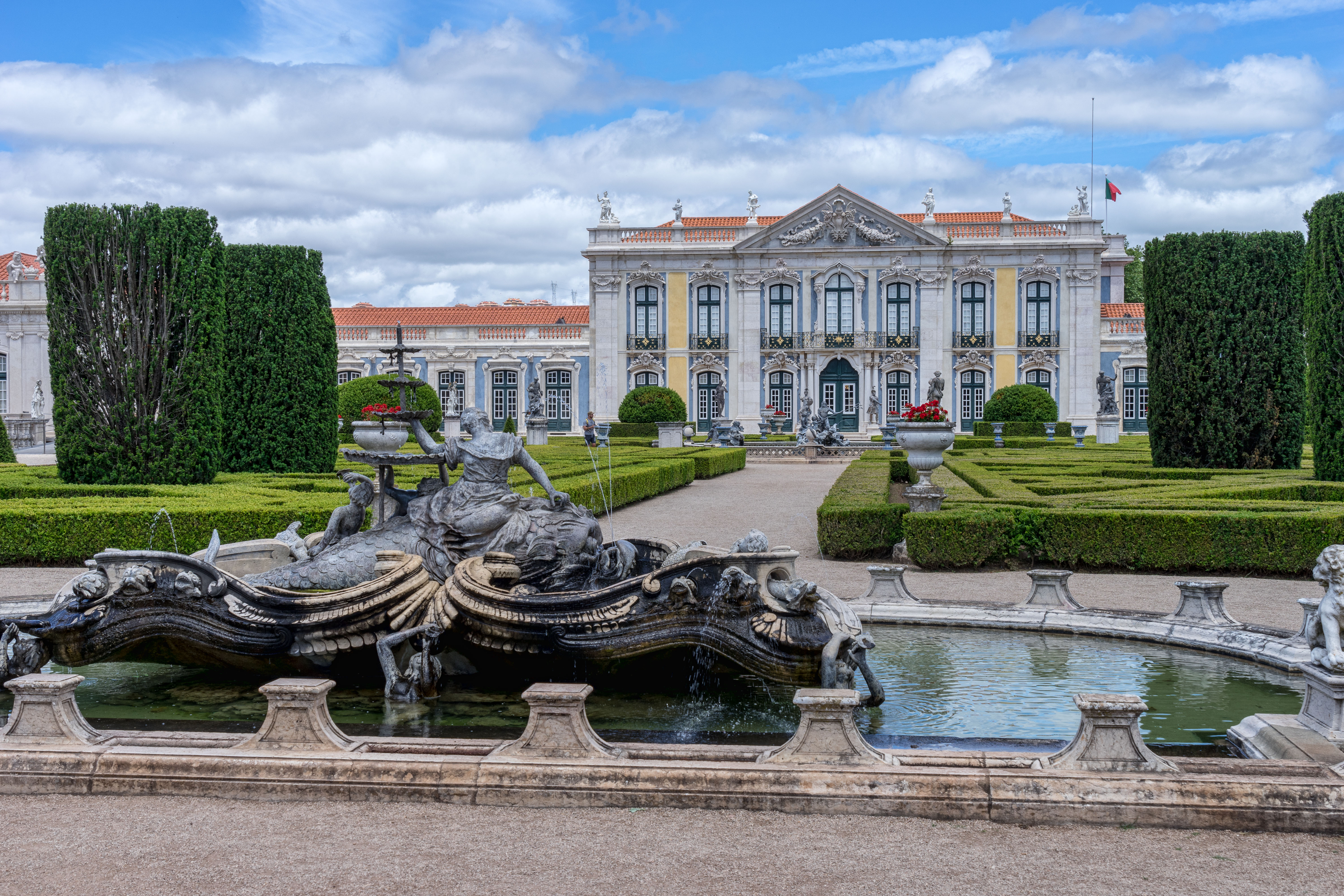 Palais royal de Queluz - Vue générale